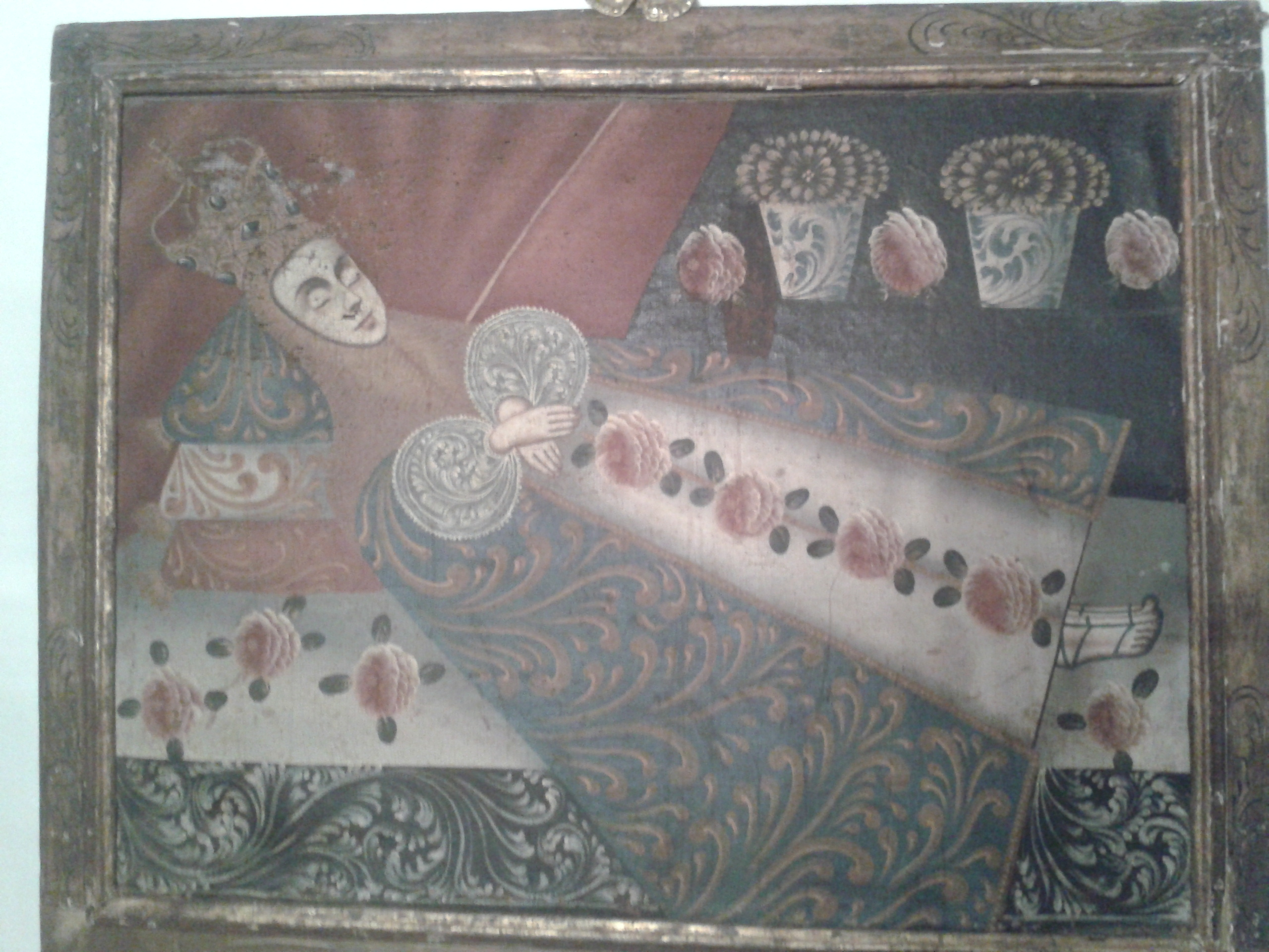 Representa la figura de la dormición de la Virgen María, Asunta al Cielo durante su Tránsito de abandonar la Tierra para ascender al Cielo. La Virgen reposa sobre un lecho de rosas y apoya su cabeza sobre almohadones. Viste Manto bordado y cruza sus manos sobre el pecho. Cubre su cabeza con una especie de cota de malla y porta corona con pedrería. Sus pies calzan sandalias. Al fondo unos jarrones llenos de rosas. En la composición se observa un sincretismo de elementos cristianos occidentales con otros netamente índigenas aportados por la cultura cuzqueña del Perú español del S. XVII como los rasgos indianos del rostro de la Virgen, el uso de sandalias y el fuerte colorido del bordado del manto, almohadas y flores del lienzo. La figura presenta un marcado porte hirático visible en la rigidez del plegado del manto con lineas rectas y composición triangular presentando a la vez un marcado sentimiento devocional y piadoso que conmueve al fiel a la oración y al respeto ante la dormición de la Virgen siguiendo los postulados impuestos en el Concilo de Trento. Marco de madera dorada con policromía.